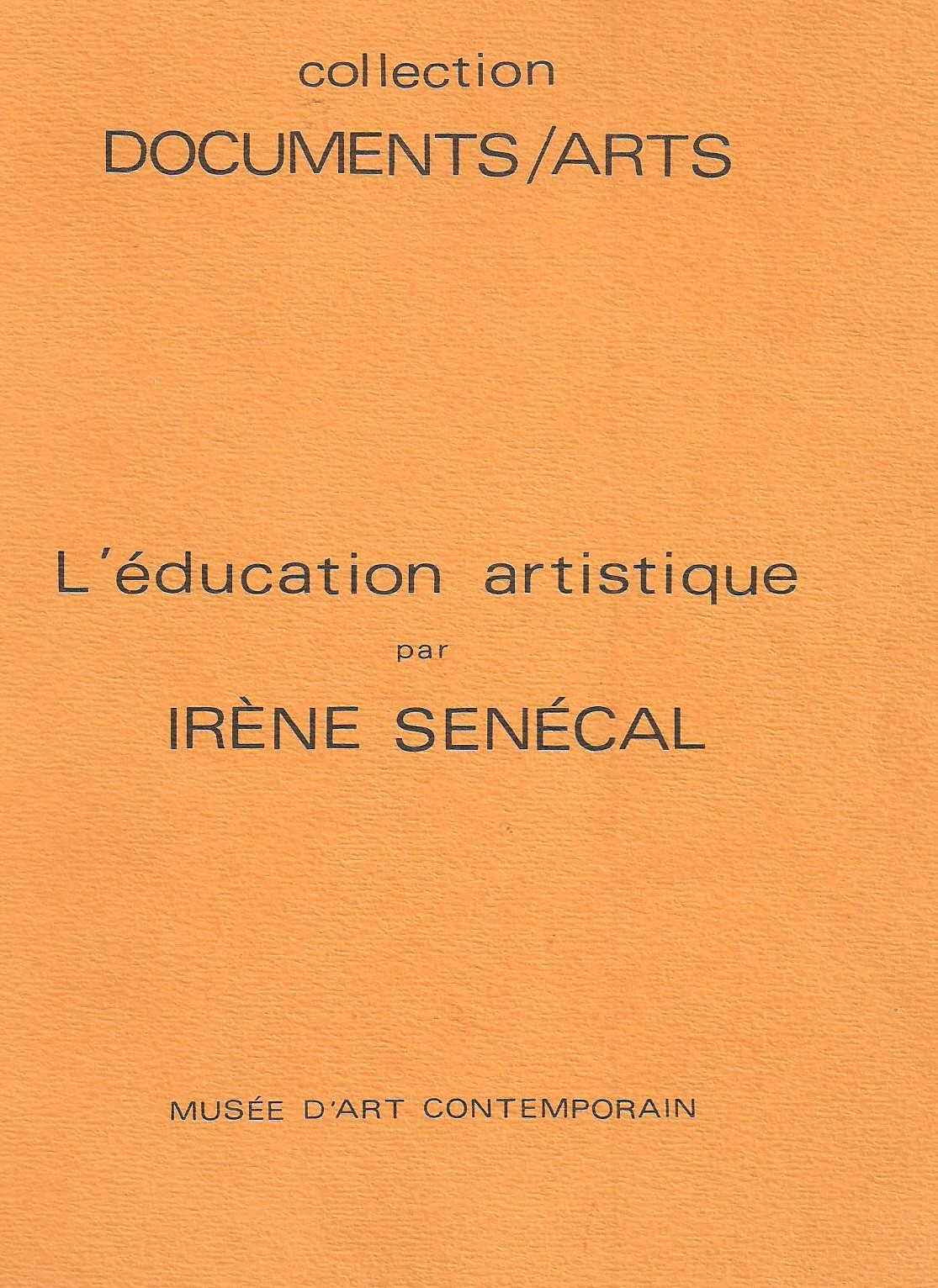 Recueil de textes sur l'éducation d'Irène Senécal